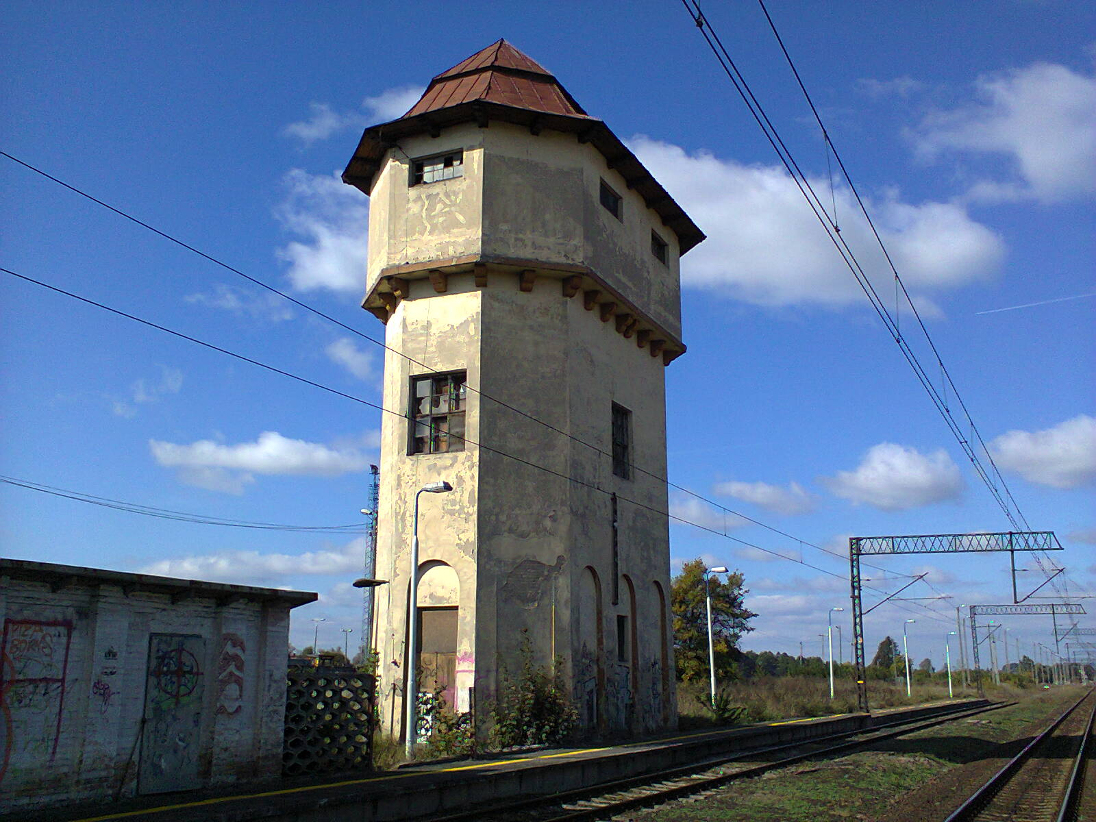 Wieża ciśnień w Grajewie